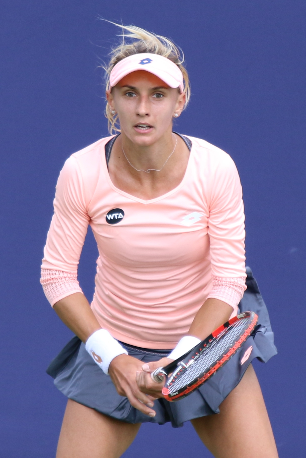 Tsurenko BM16 (22)